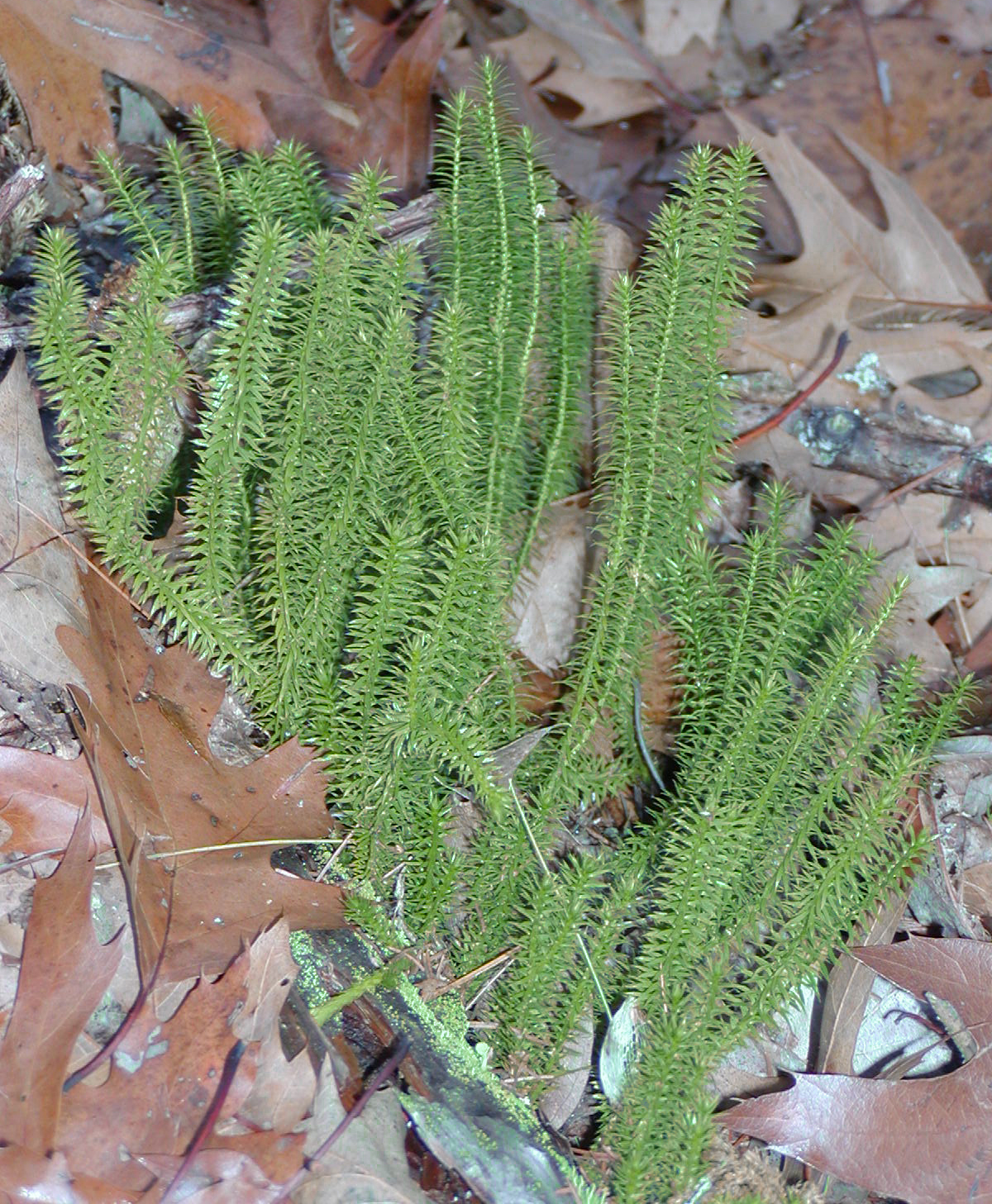 Huperzia lucidula (syn. Lycopodium lucidulum)